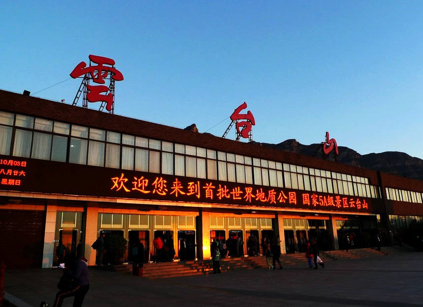 Yuntai mountain